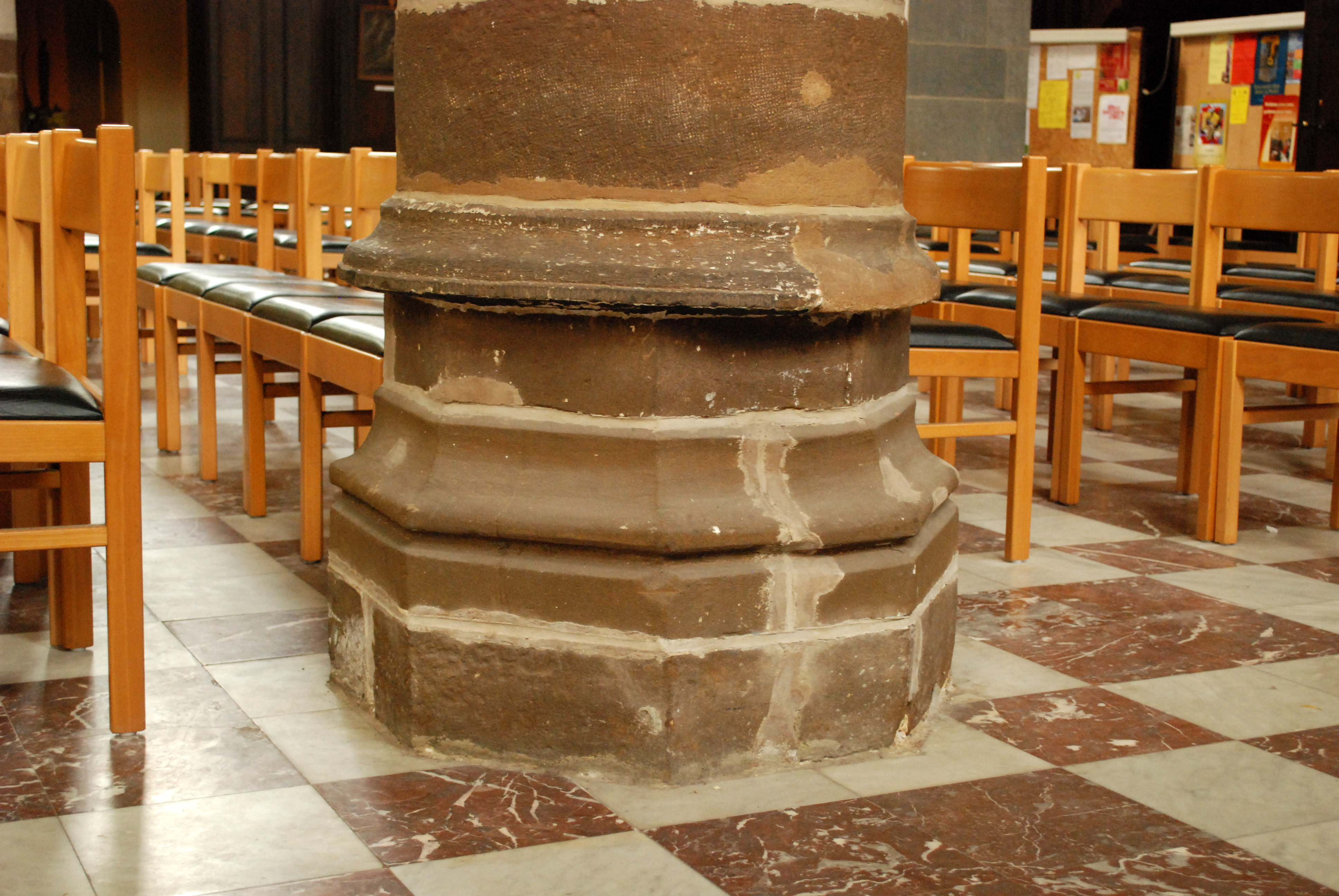 Belgique - Wallonie - Wavre - Église Saint-Martin de Limal